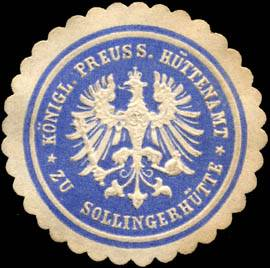 Sealing stamp Title: Königlich Preussische Hüttenamt zu Sollingerhütte Description: blau, weiß, geprägt Place: size: 3 cm